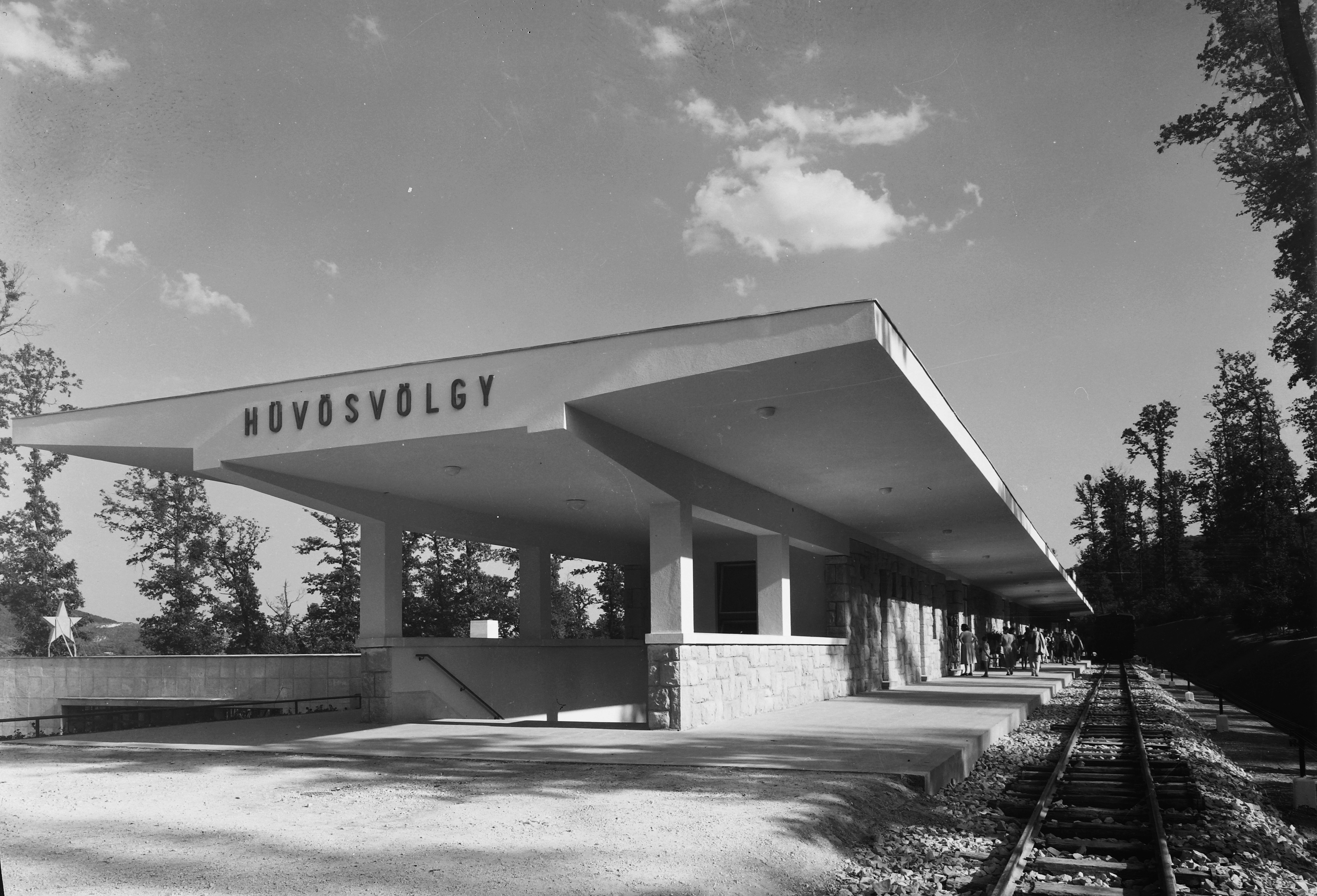 Budapest, Hűvösvölgy, a Gyermekvasút (Úttörővasút) végállomása.